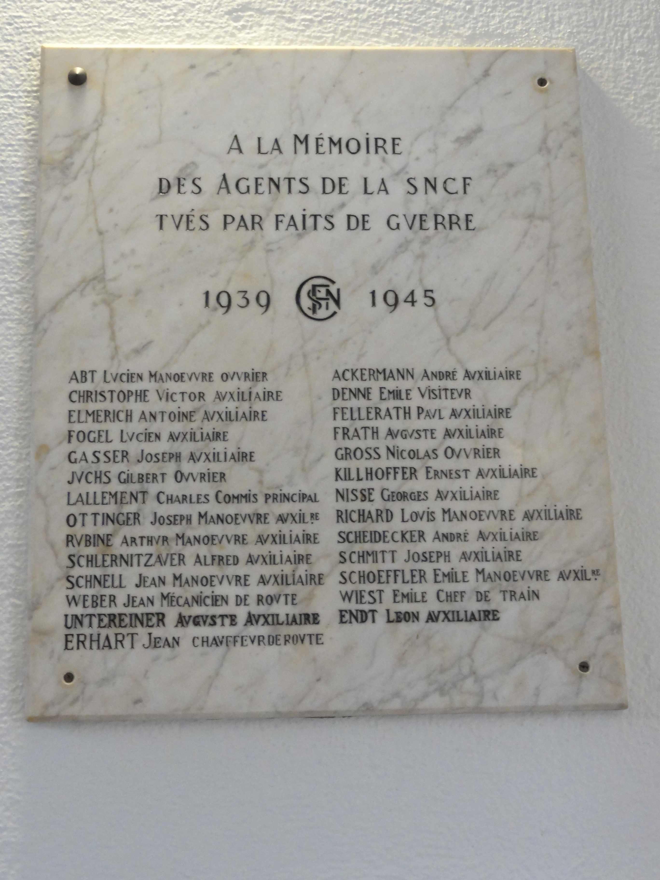 Sarrebourg (Moselle) gare plaque agents SNCF guerre 39-45